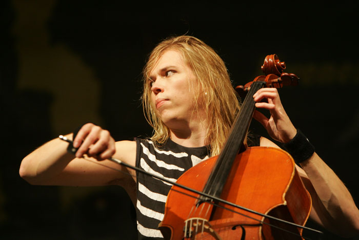 apocalyptica tocando en rock al parque 2005